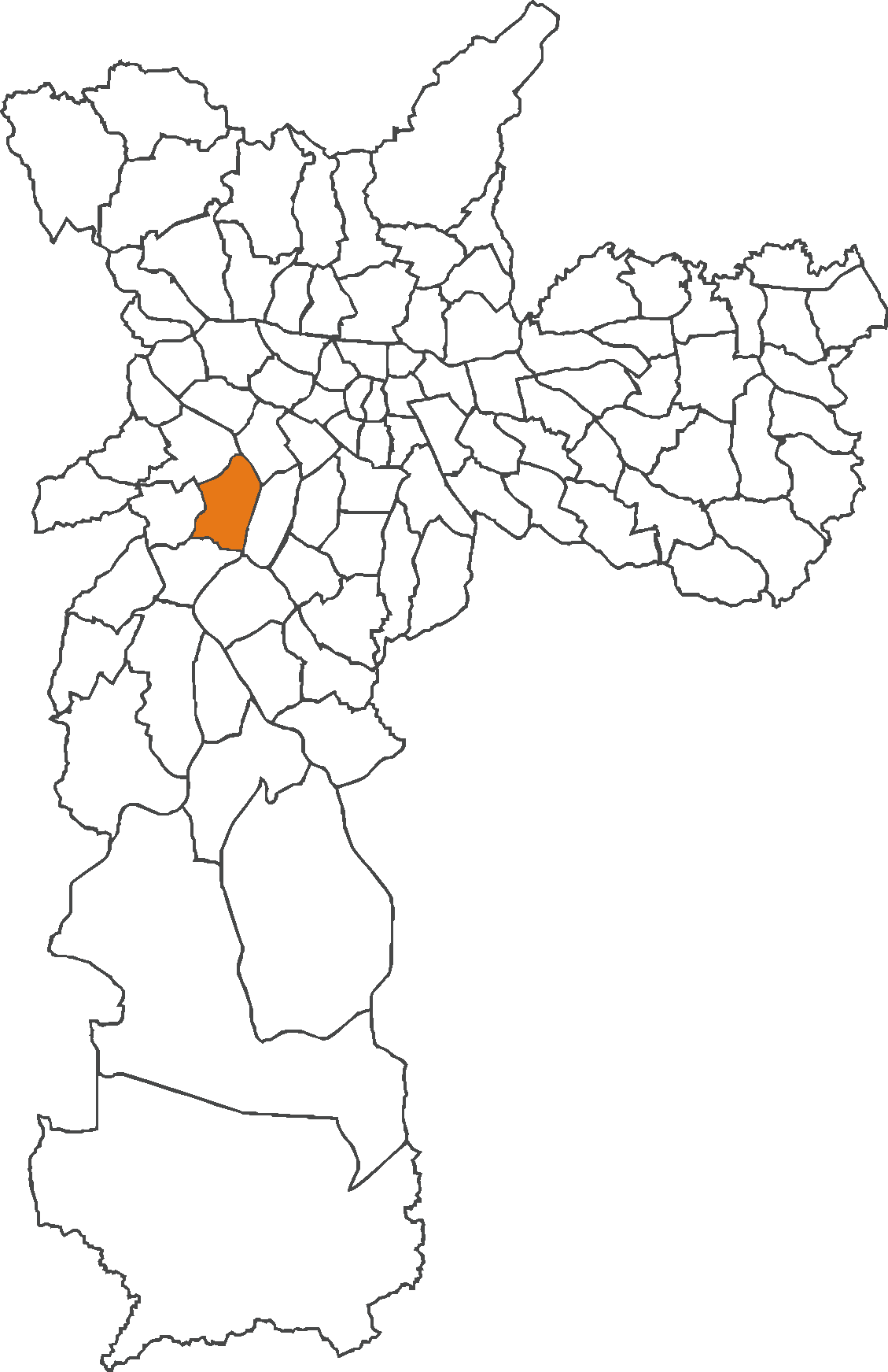 Localização do distrito do Morumbi no município de São Paulo.